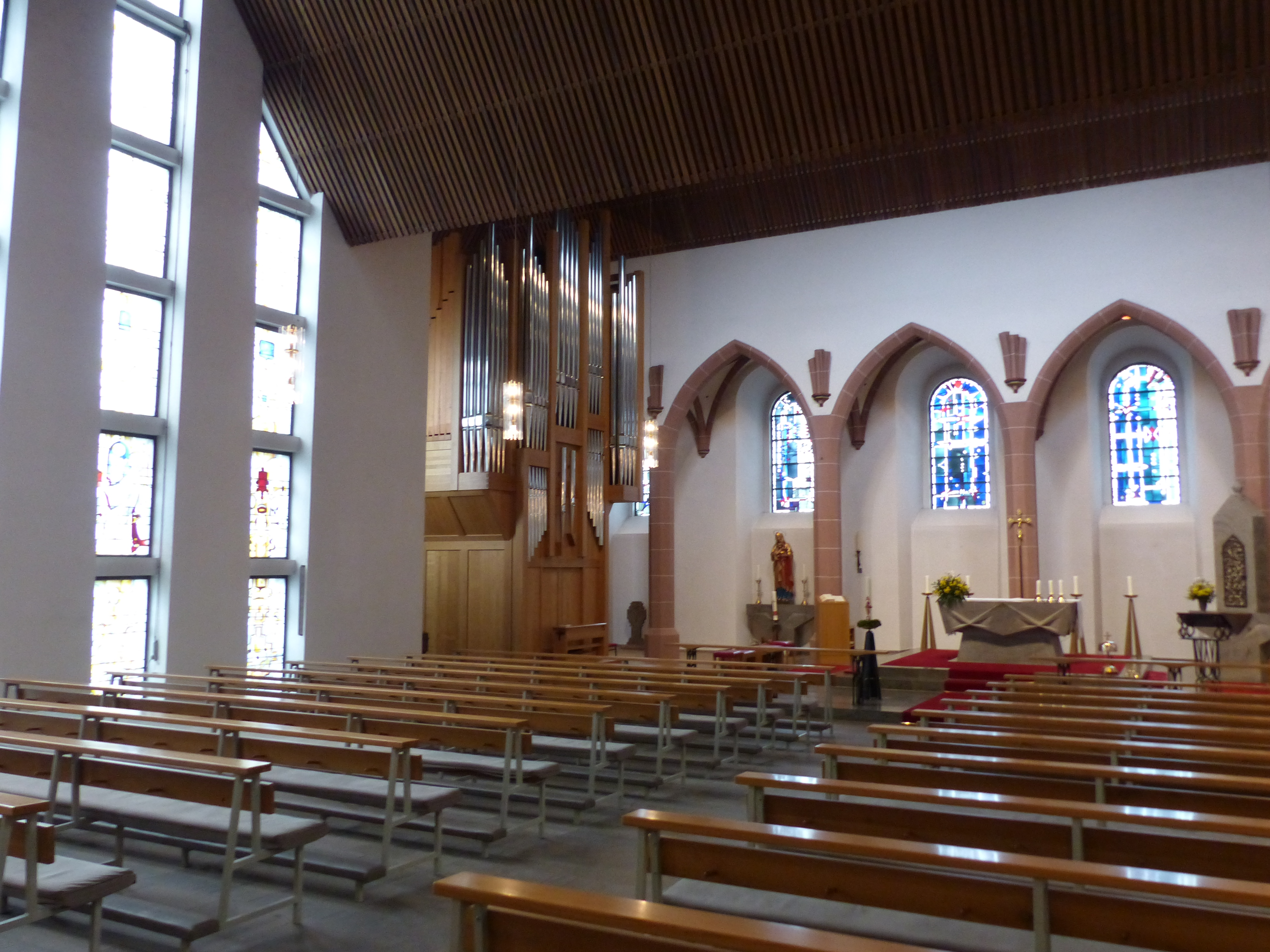 St. Michael Waldbröl: Innenansicht